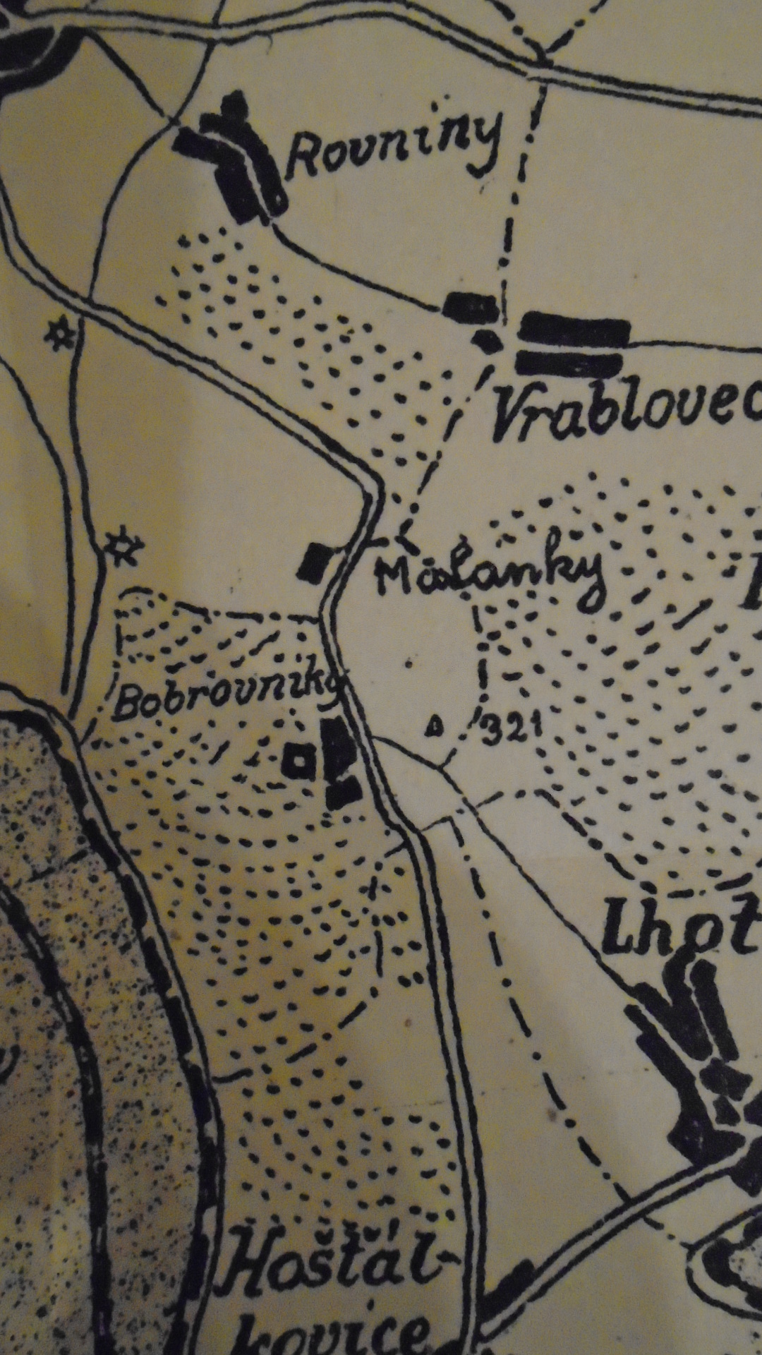 Mapa Bobrovníků z roku 1924. Z knihy BENA, Lev. Hlučínsko: Stručná informace a průvodce krajem. Brno: Zemský cizinecký svaz pro Moravu a Slezsko, 1924.